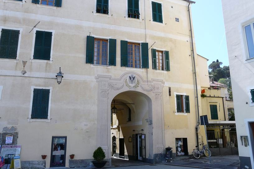 Foto varie di Laigueglia, Liguria, Italia